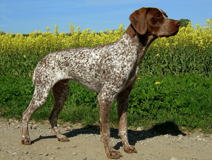 Braque Francais